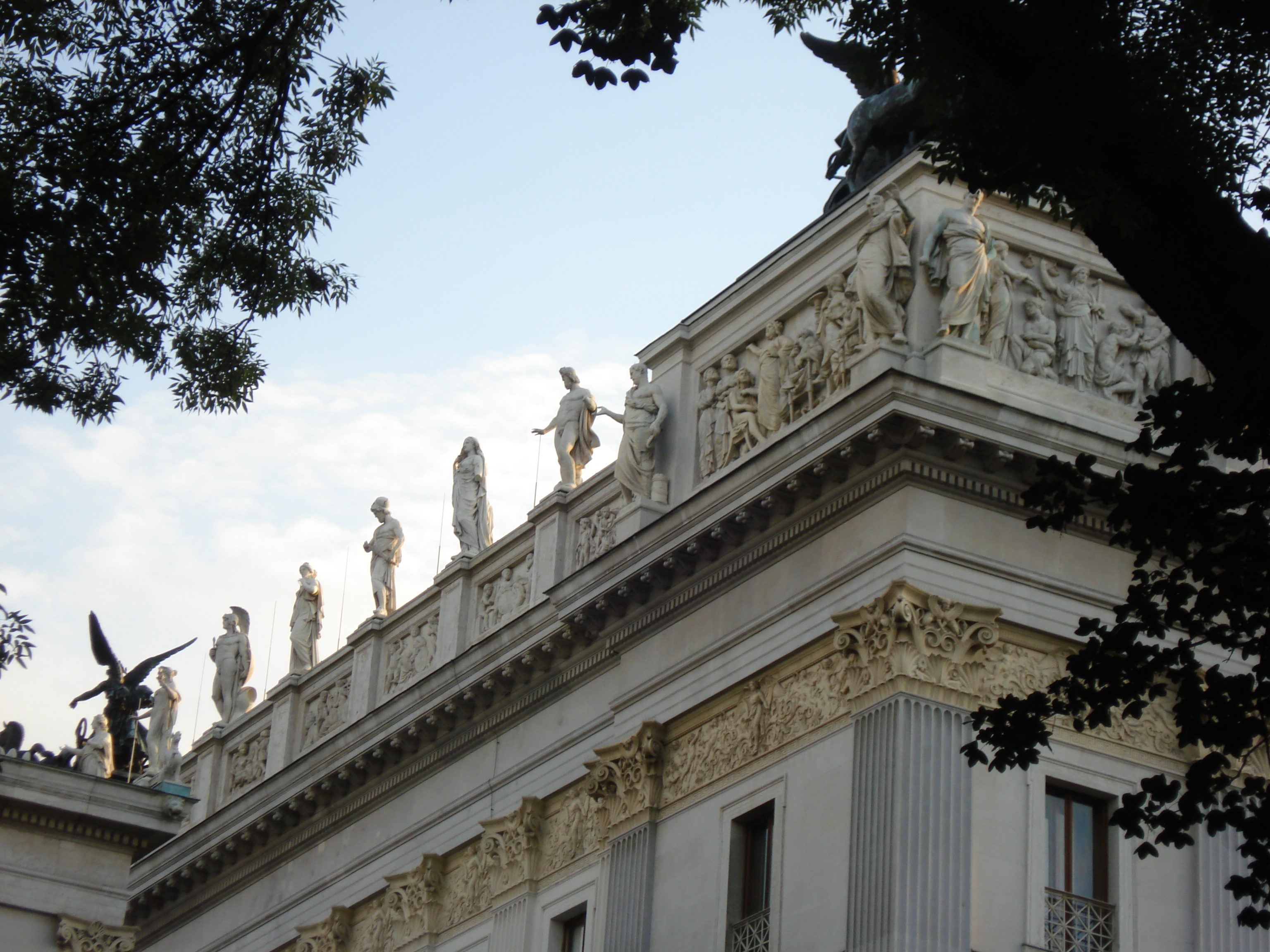 Вена, Парламент